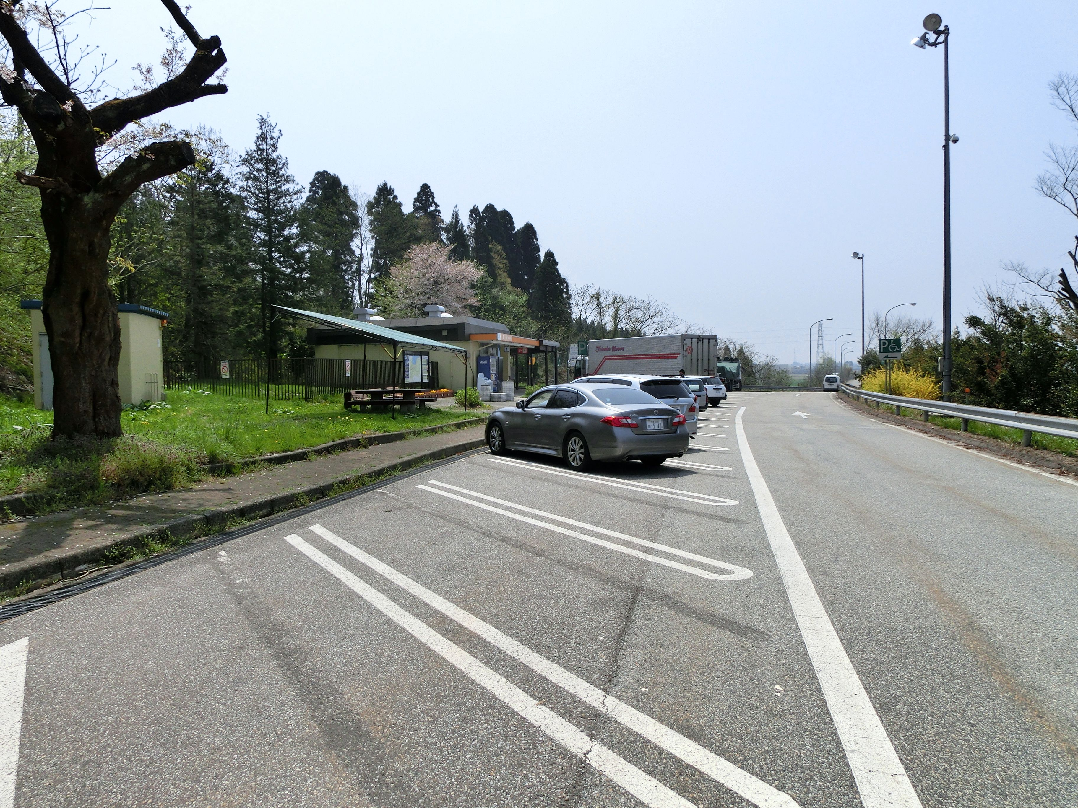 北陸自動車道 高岡パーキングエリア（上り線）